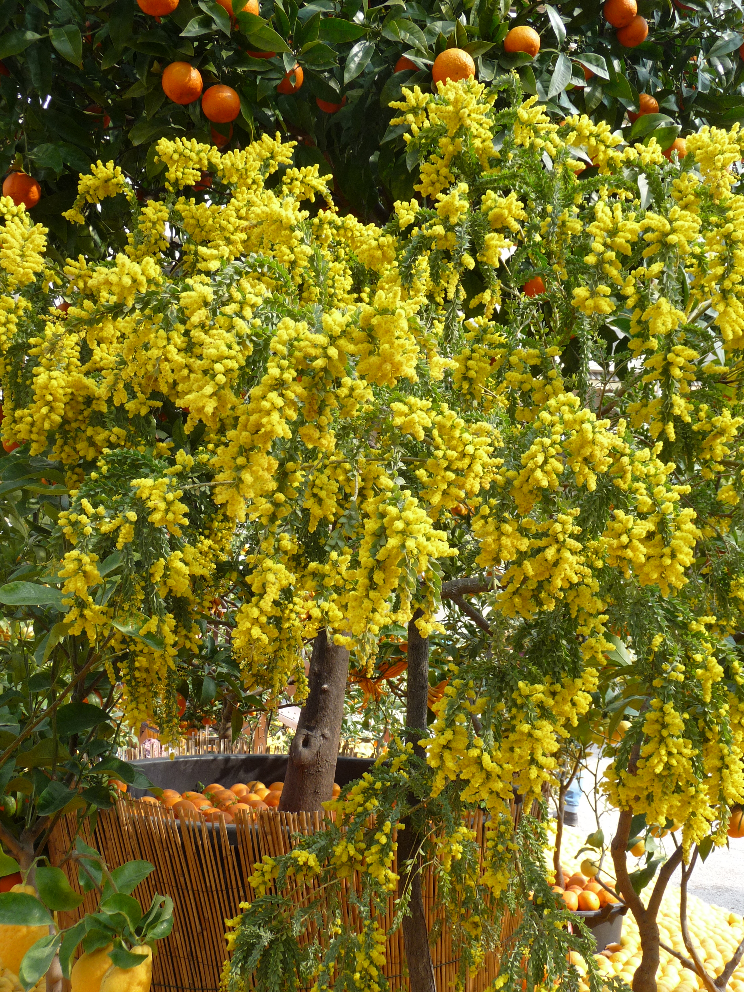 Mimosa (Acacia dealbata).